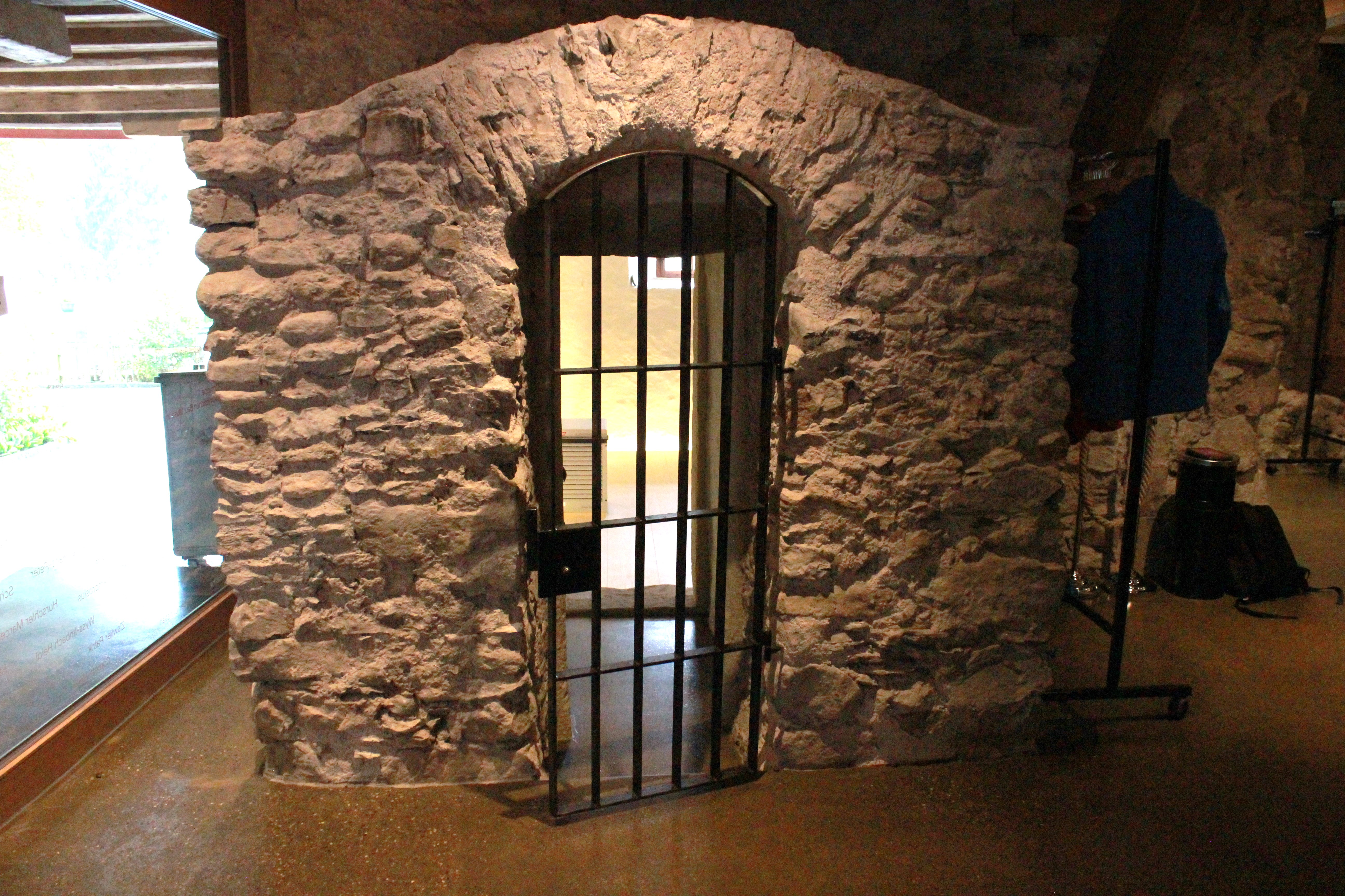 Der Archivraum im Erdgeschoss des Rathauses von Sempach. Darin werden Objekte des religiösen Lebens in Sempach ausgestellt.